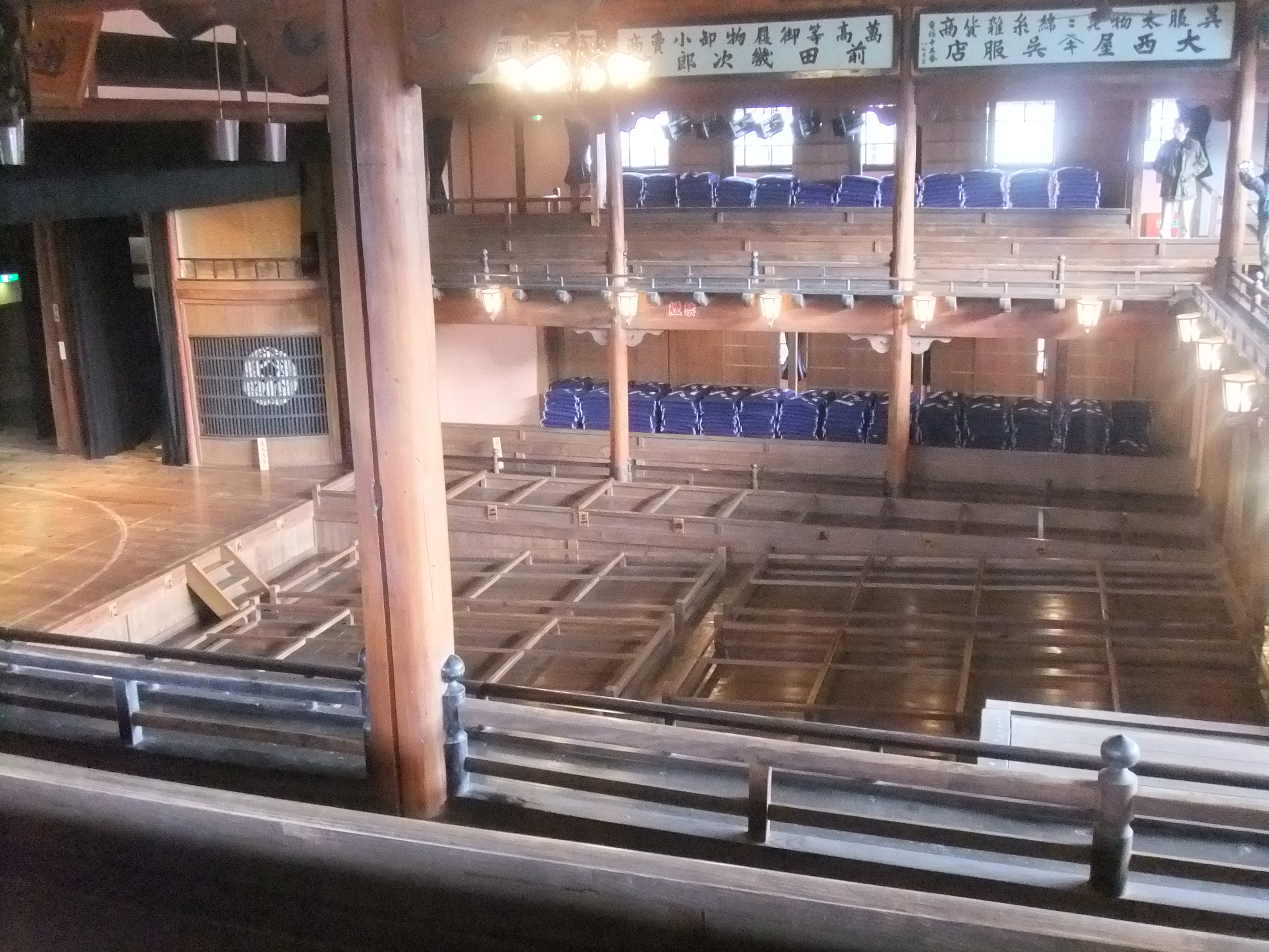 内子座 観客席